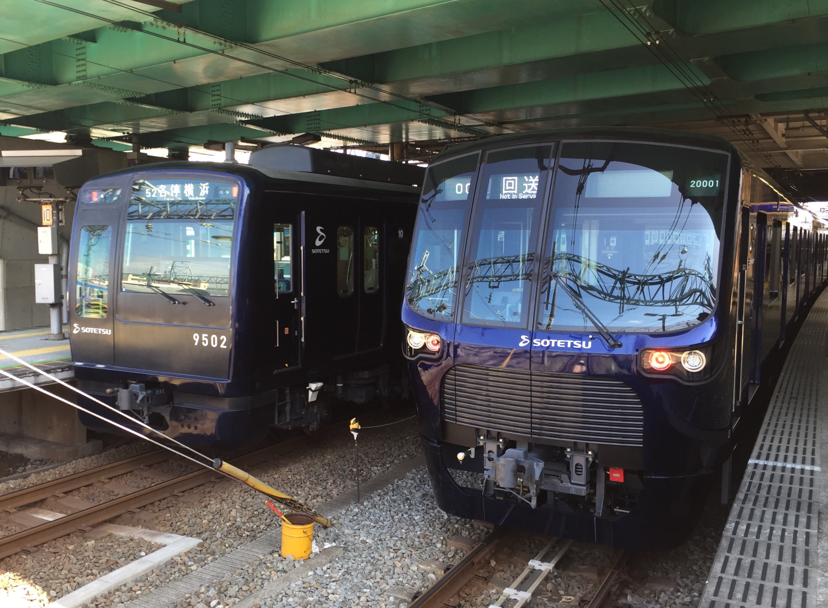 YOKOHAMA NAVYBLUE の塗装をまとった相鉄20000系（右）と9000系リニューアル車（左）。かしわ台駅にて撮影。